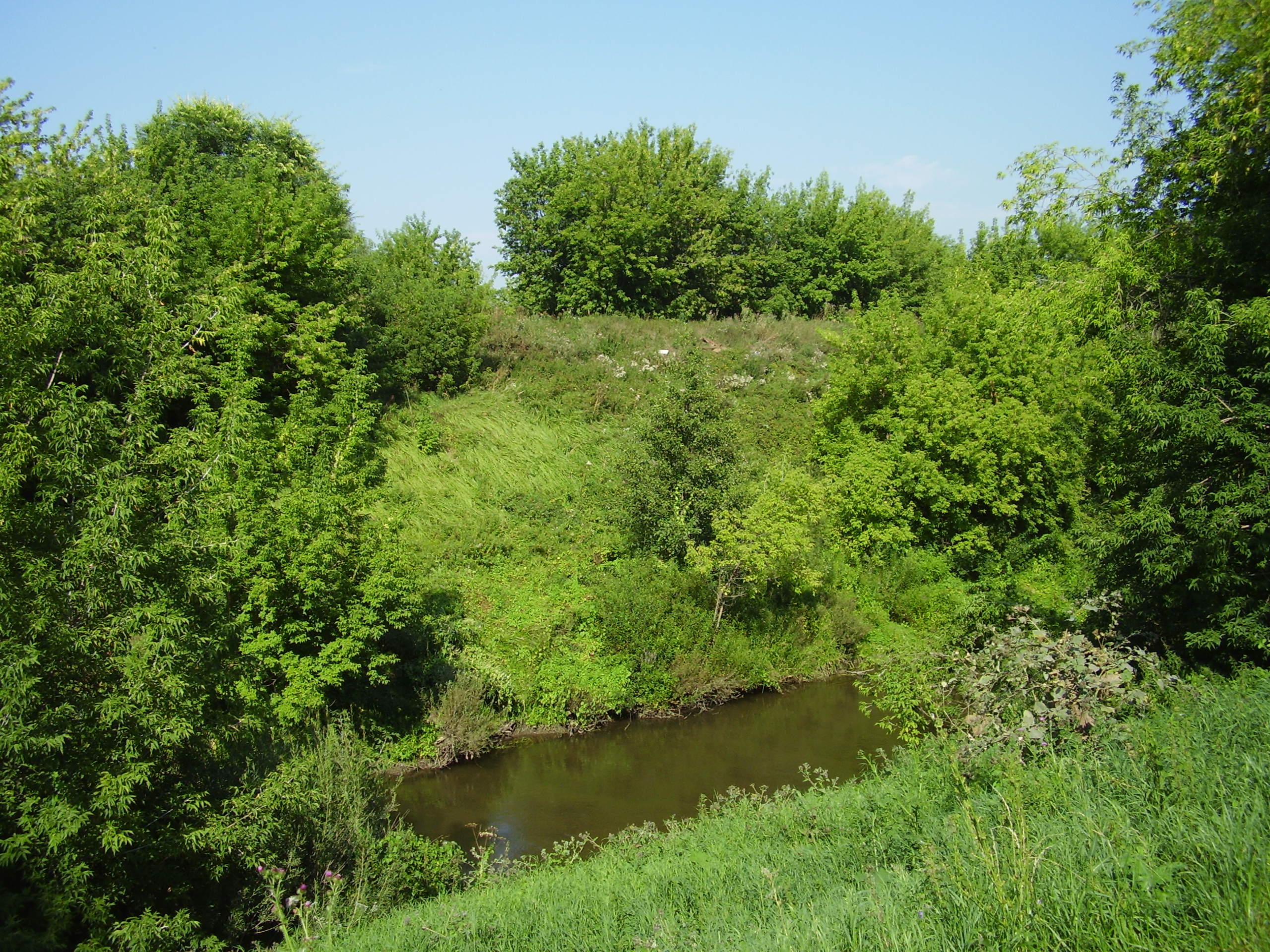 Река Девица у г. Семилуки